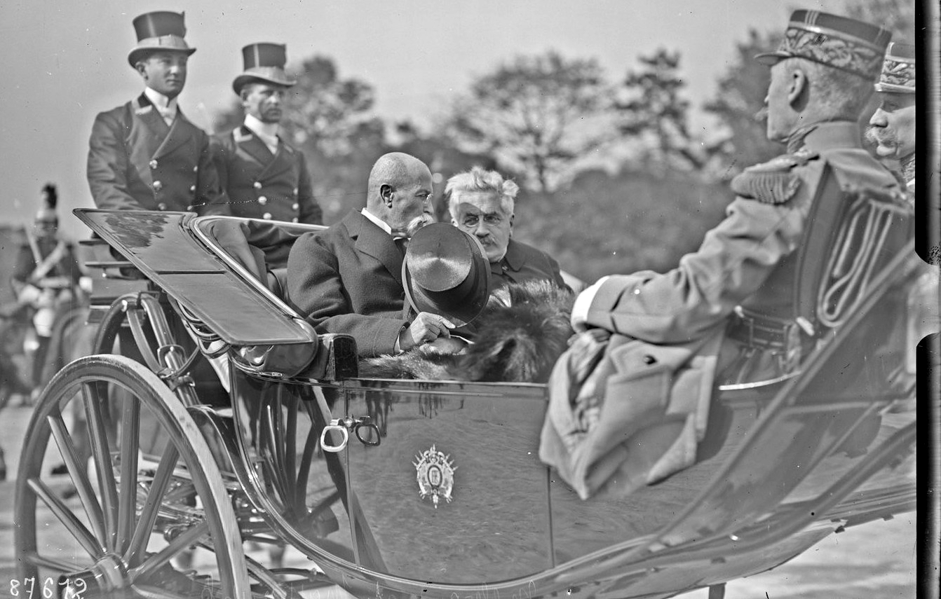 Tomáš Masaryk accueilli à Paris par Alexandre Millerand.